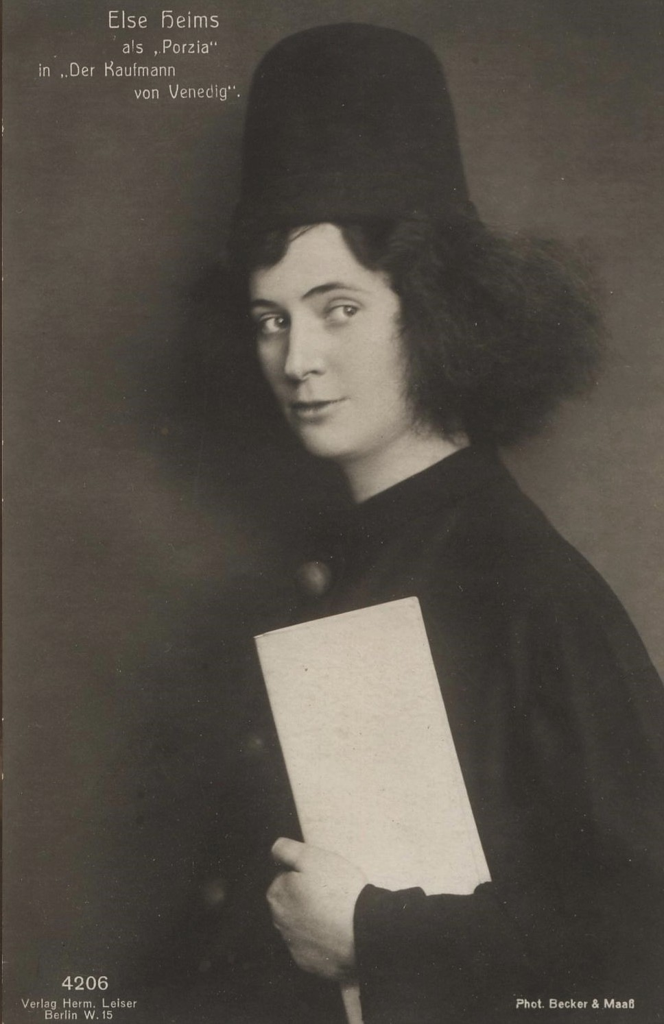 Else Heims als 'Porzia' in 'Der Kaufmann von Venedig', c. 1920. Photopostkarte des Ateliers (Otto) Becker & (Heinrich) Maass